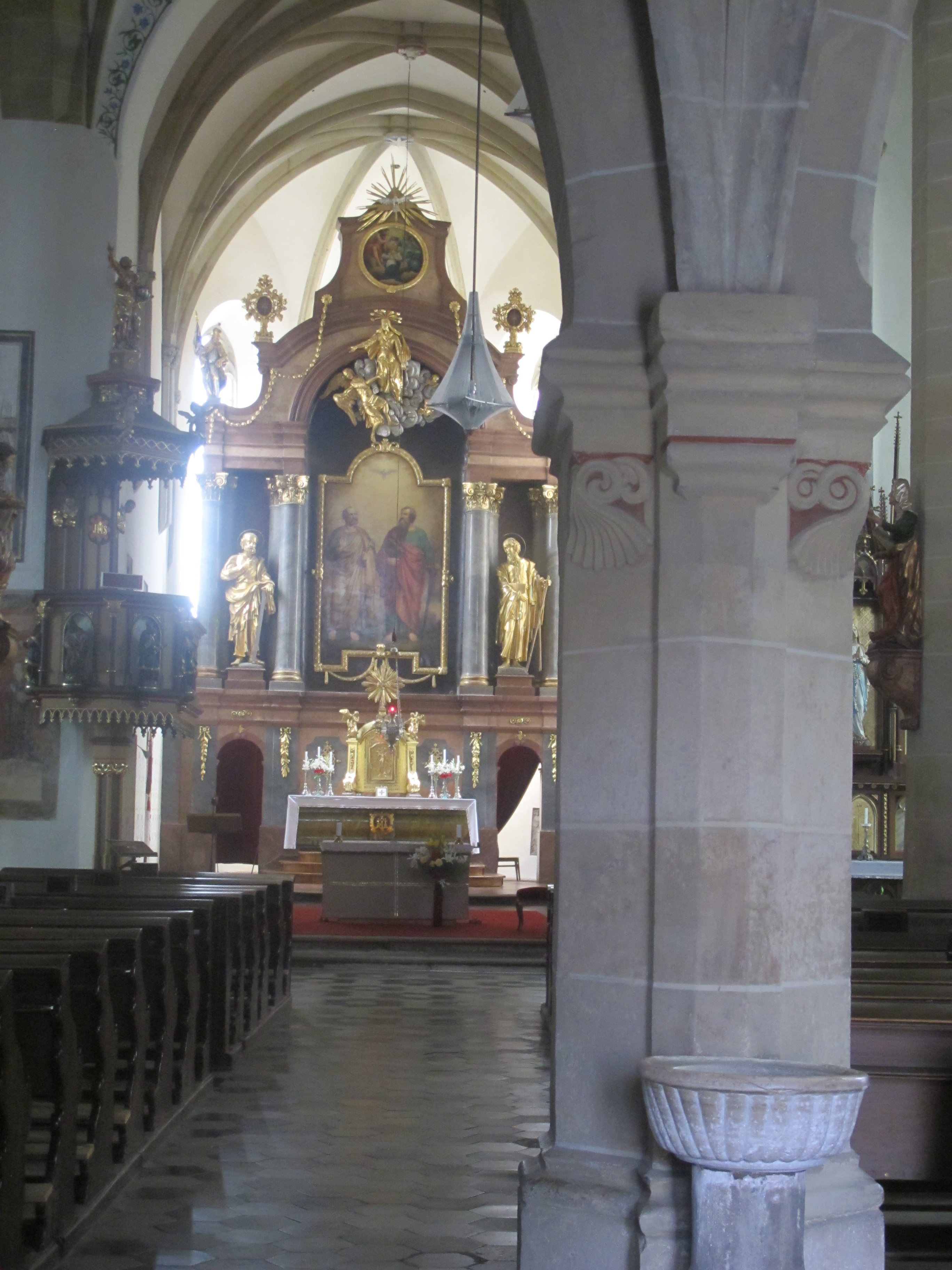 Kostel svatých Petra a Pavla, Čáslav-Staré Město